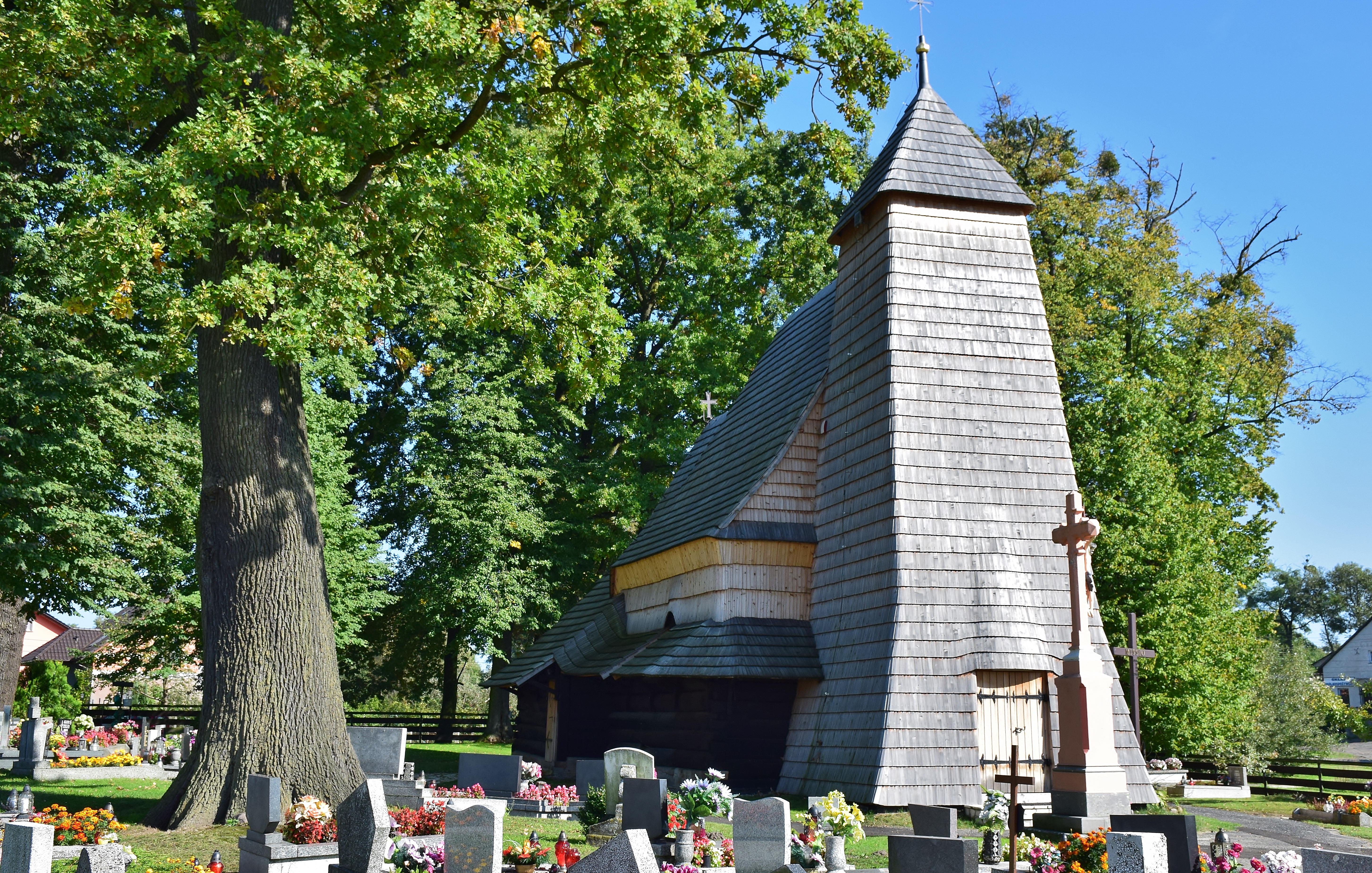 Zacharzowice, kościół fil. p.w. św. Wawrzyńca, ok. 1580, 1824-1827